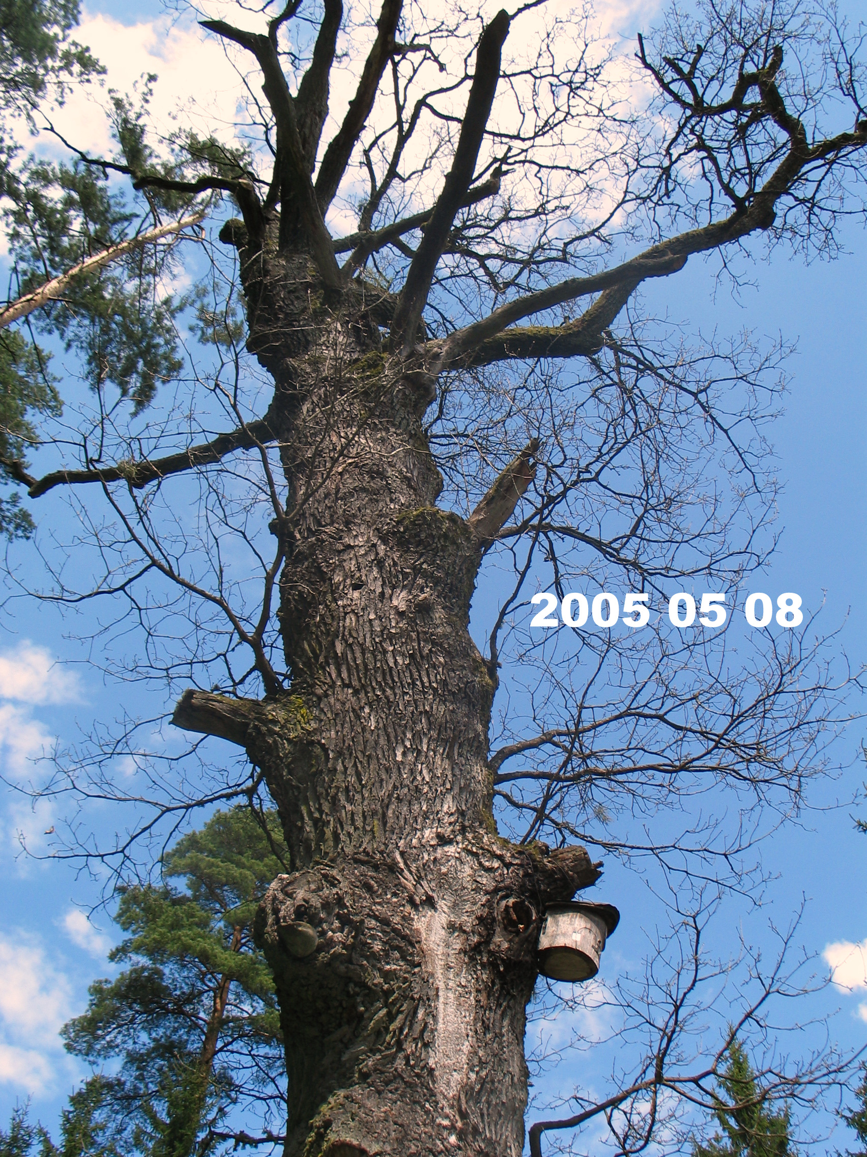 Žvėrinčiaus ąžuolas Prienai